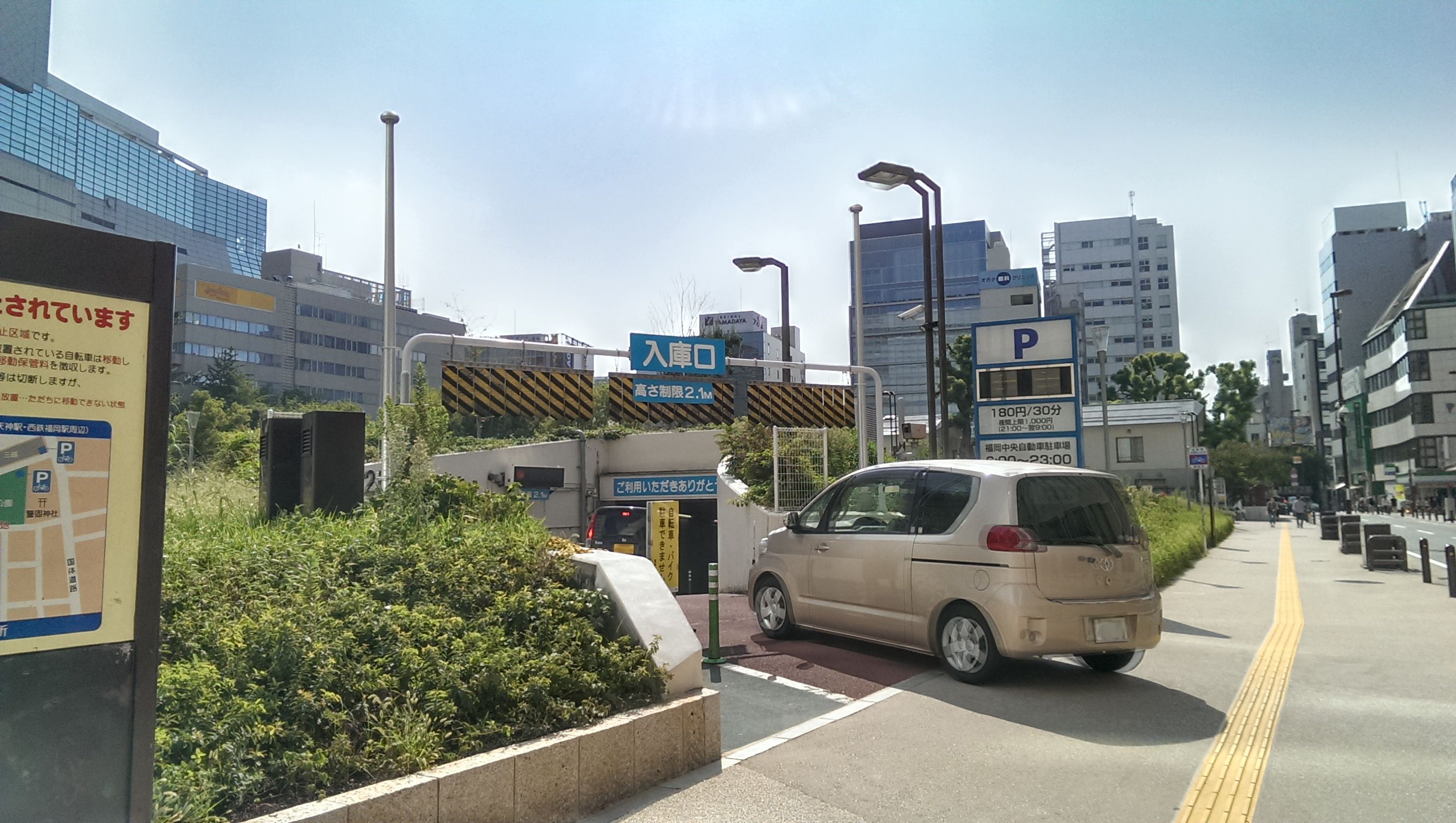 警固公園改修後の福岡中央駐車場入口。ナンバープレートはプライバシー処理済。